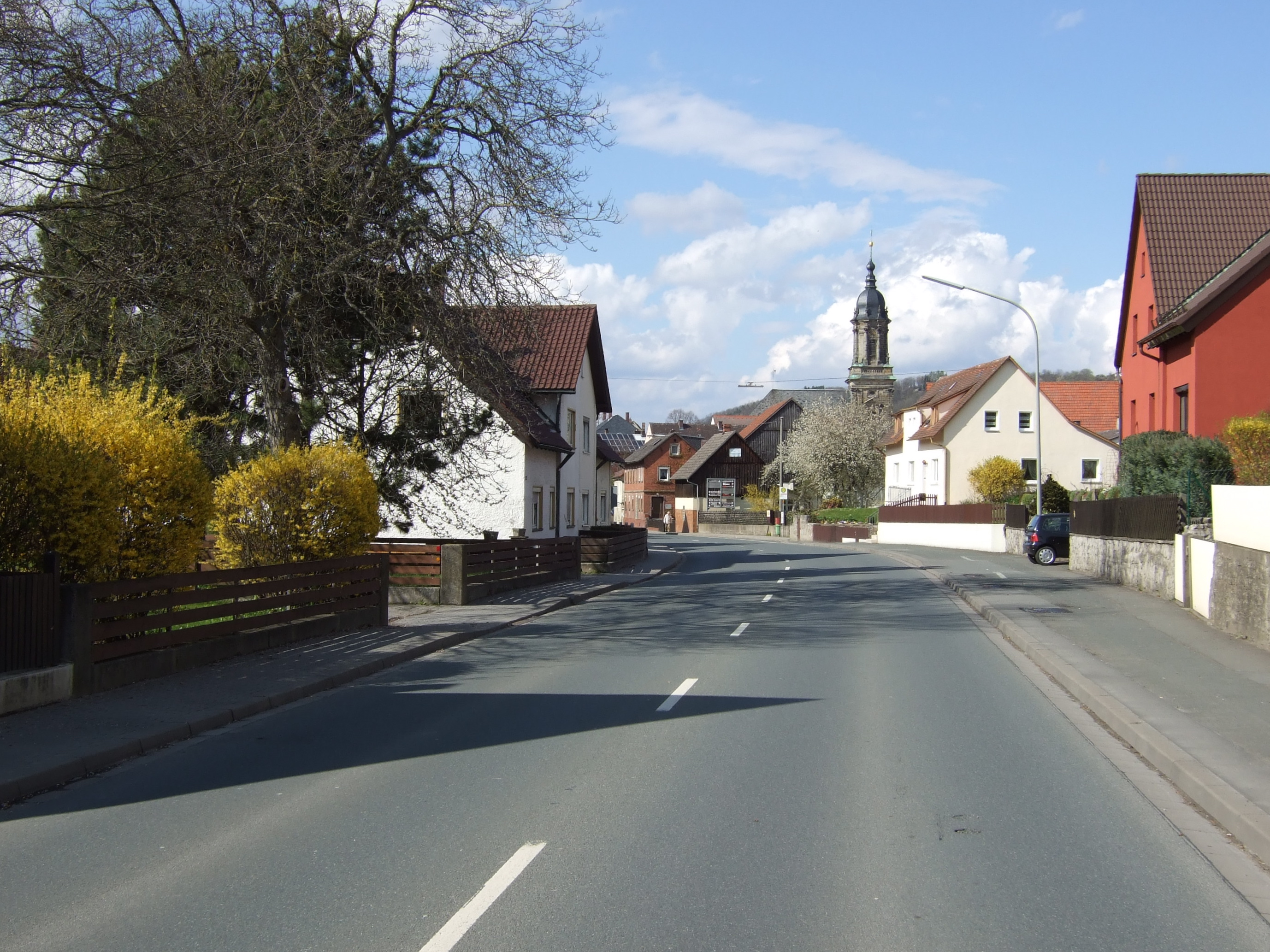 B2 in Bindlach